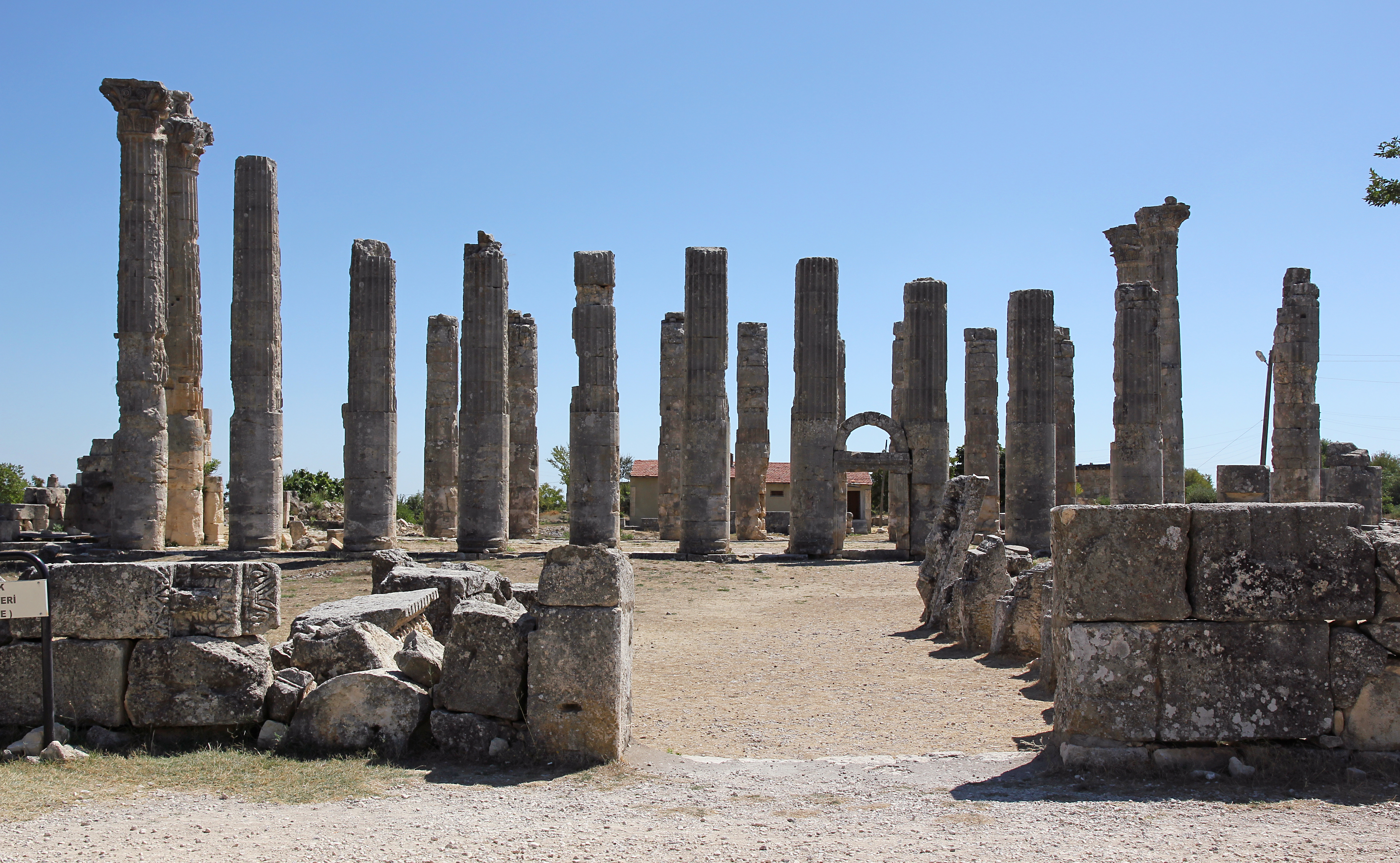 Diokaisareia, antike Stadt in Kilikien bei Uzuncaburç, Südtürkei, Tempel des Zeus Olbios